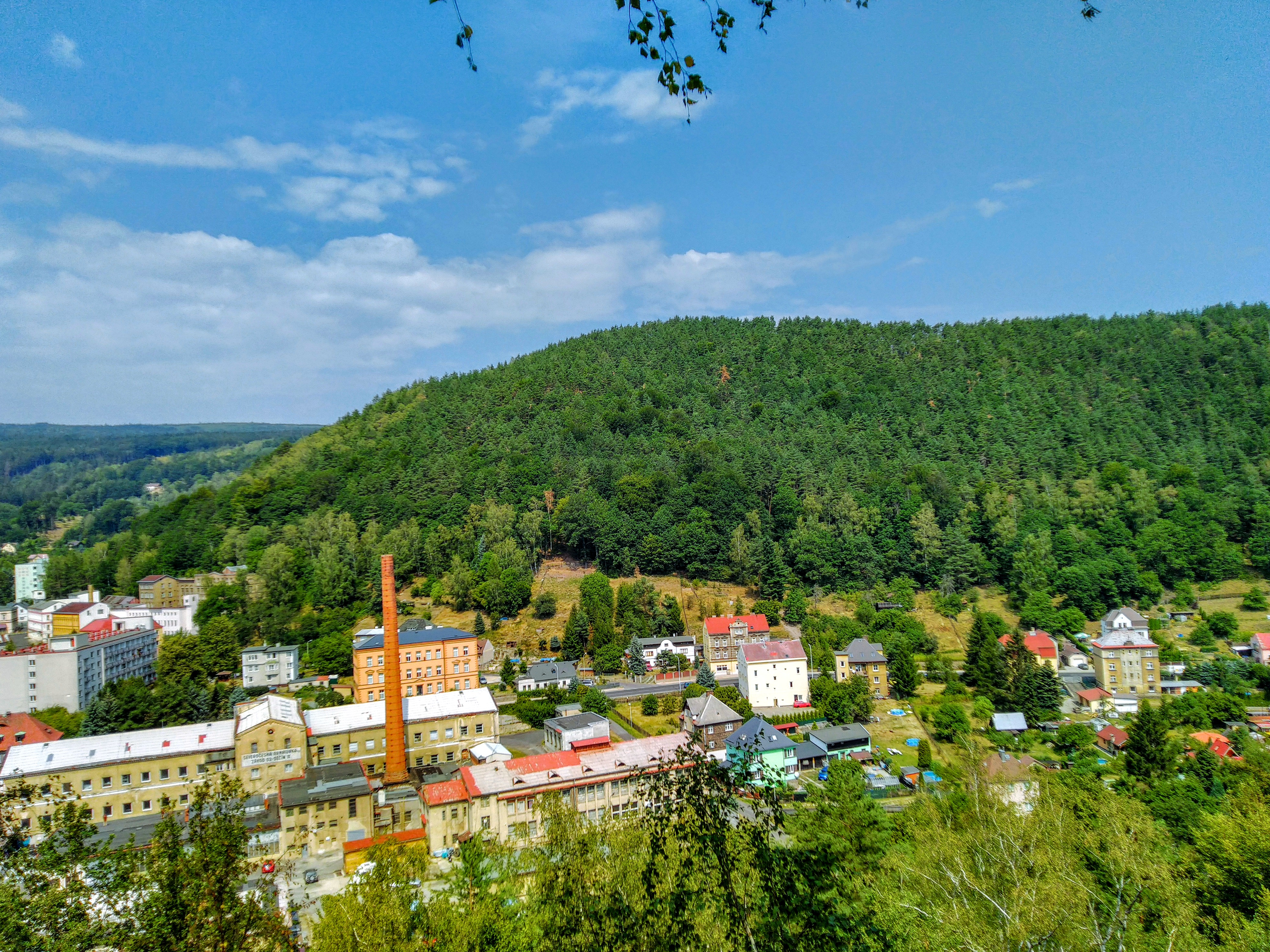 Pohled na Písečný vrch z jihu.